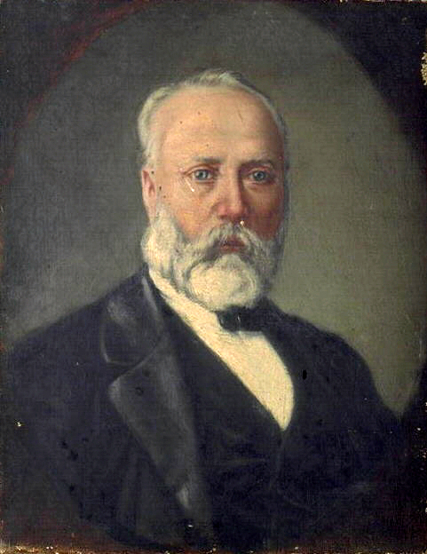 Jean-Marie Oscar Gué - autoportrait